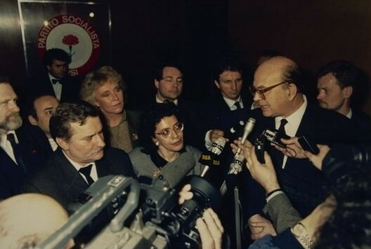 Incontro del leader polacco Lech Walesa con i Capigruppo dei partiti: DC Forlani; PCI Occhetto; PSI Craxi